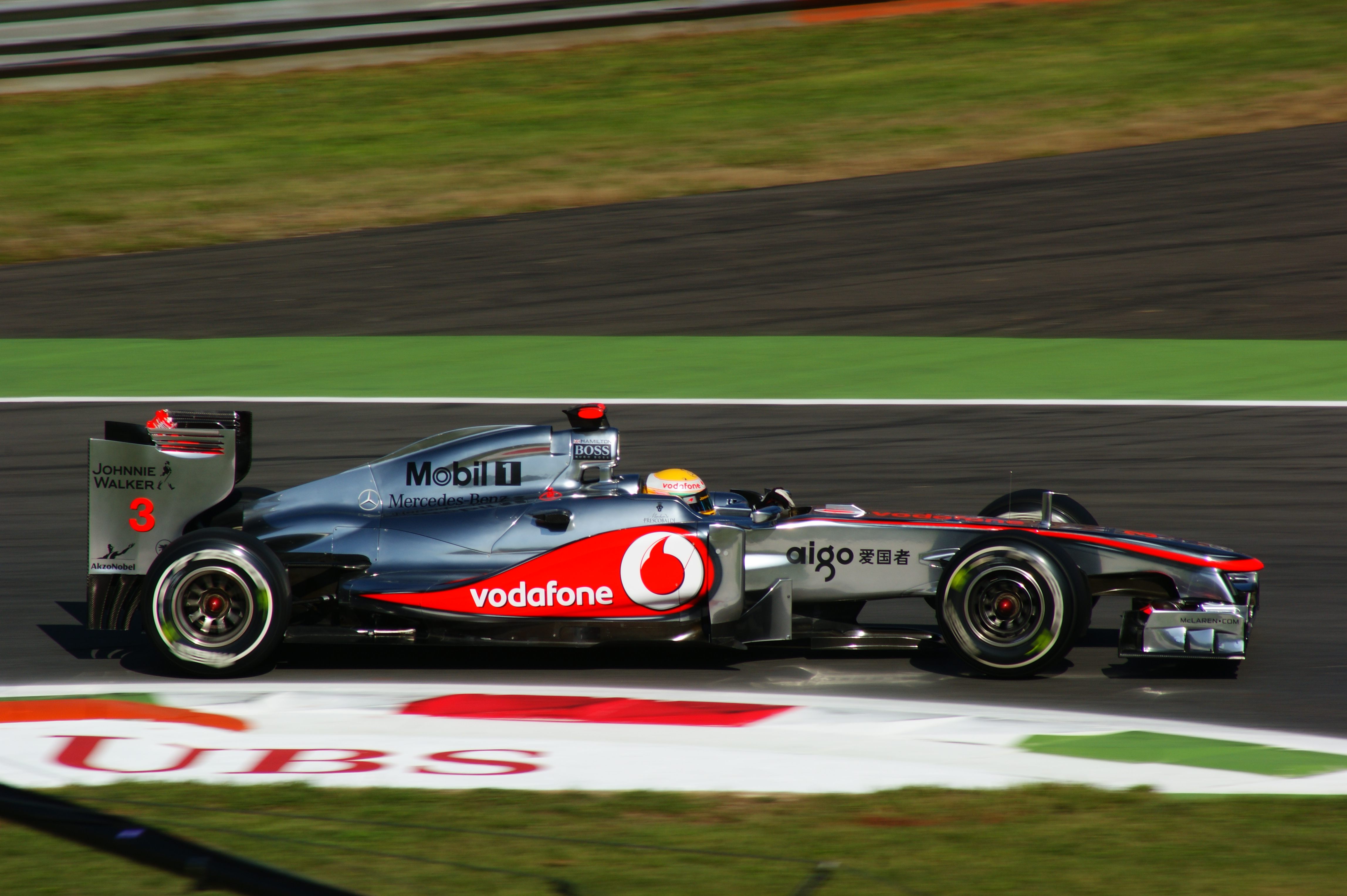 Lewis Hamilton alla prima variante Monza 2011